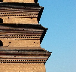 小雁塔叠涩出檐。本图片是由图片File:Xiao yan ta.jpg剪切而成。